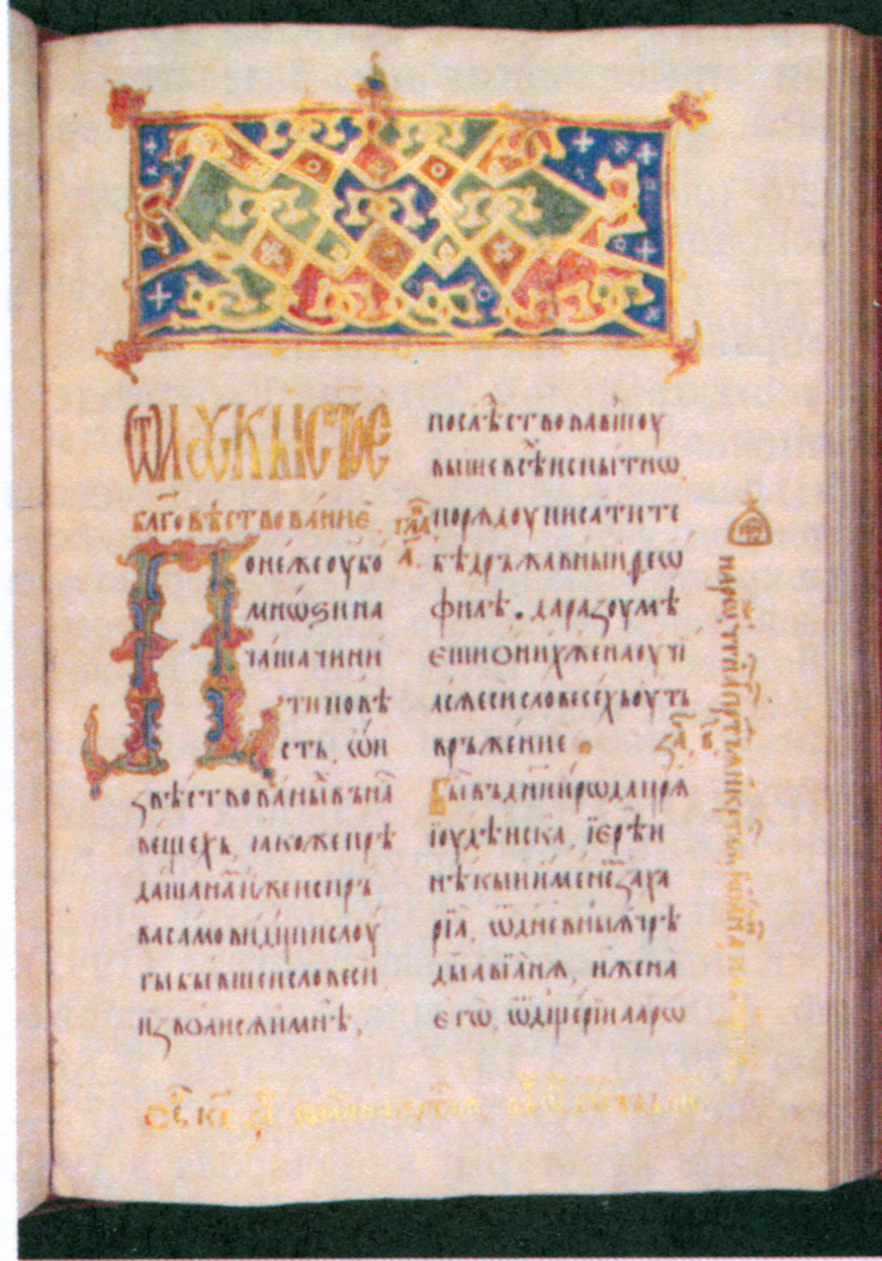 Фотография страницы Слуцкого Евангелия